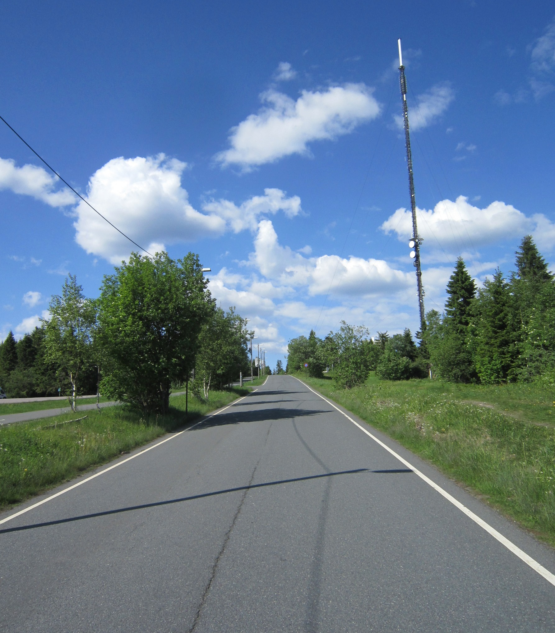 Tryvannsveien i Oslo